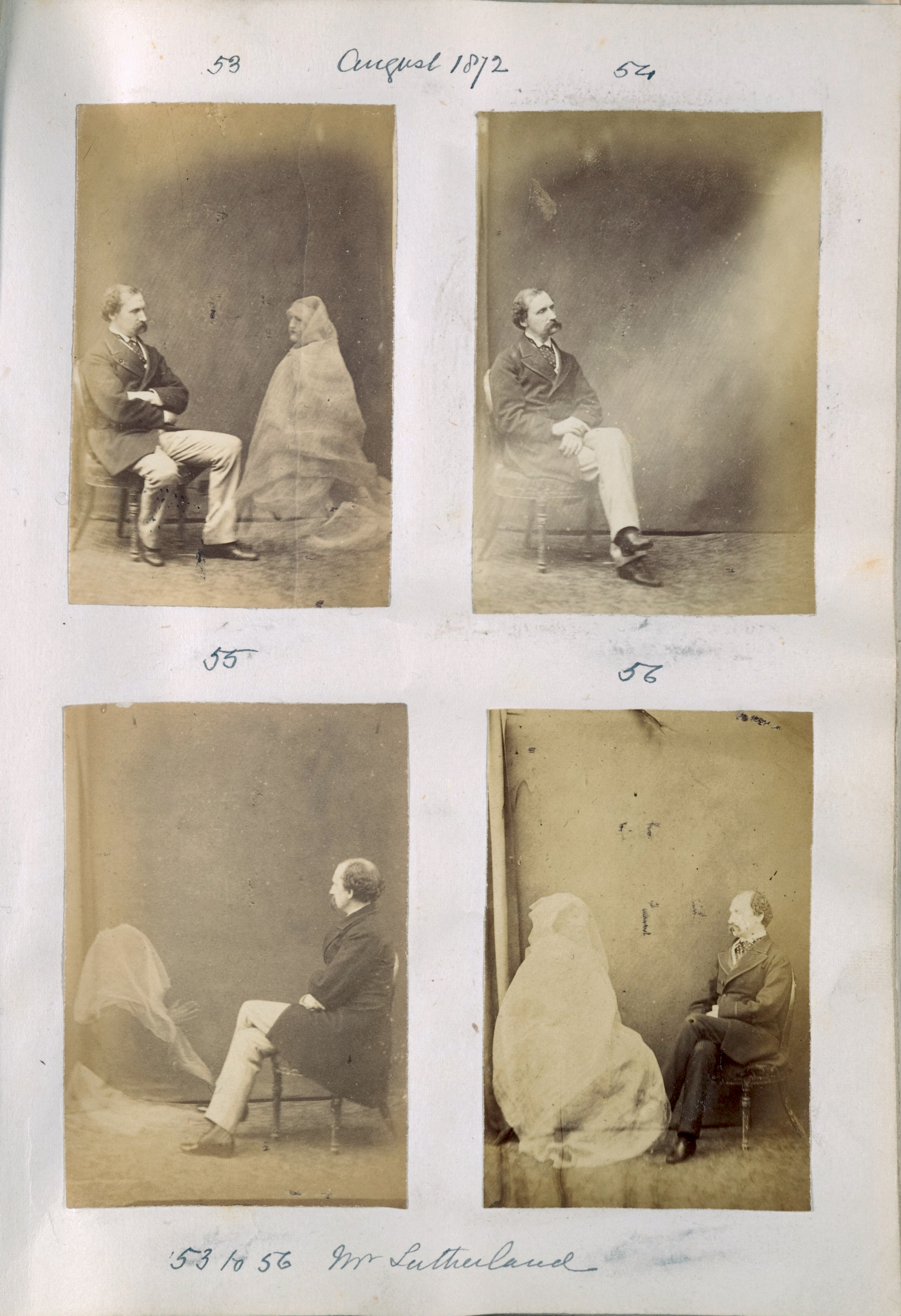 Album; Albums